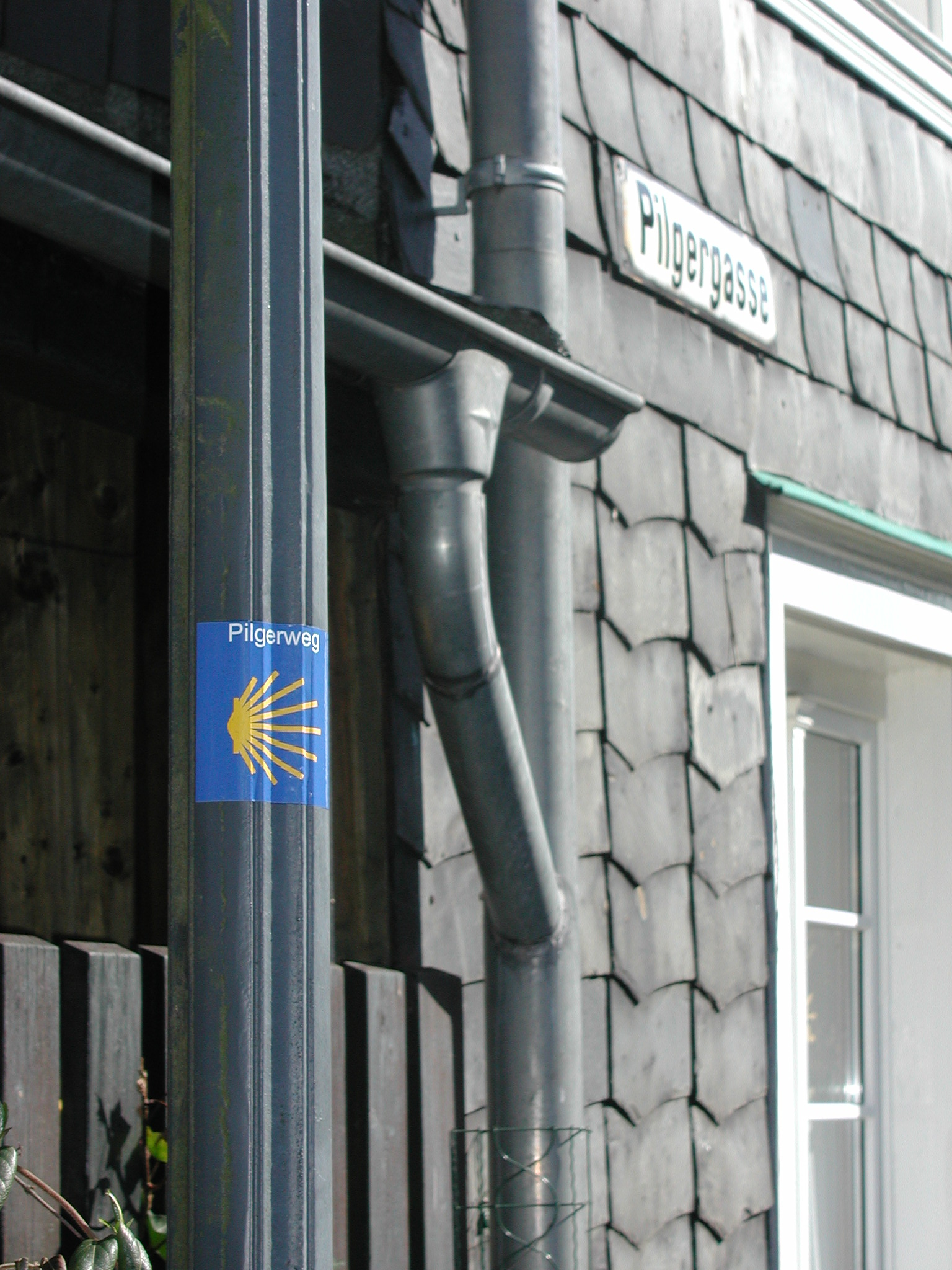 Pilgerweg durch die Pilgergasse in Lennep